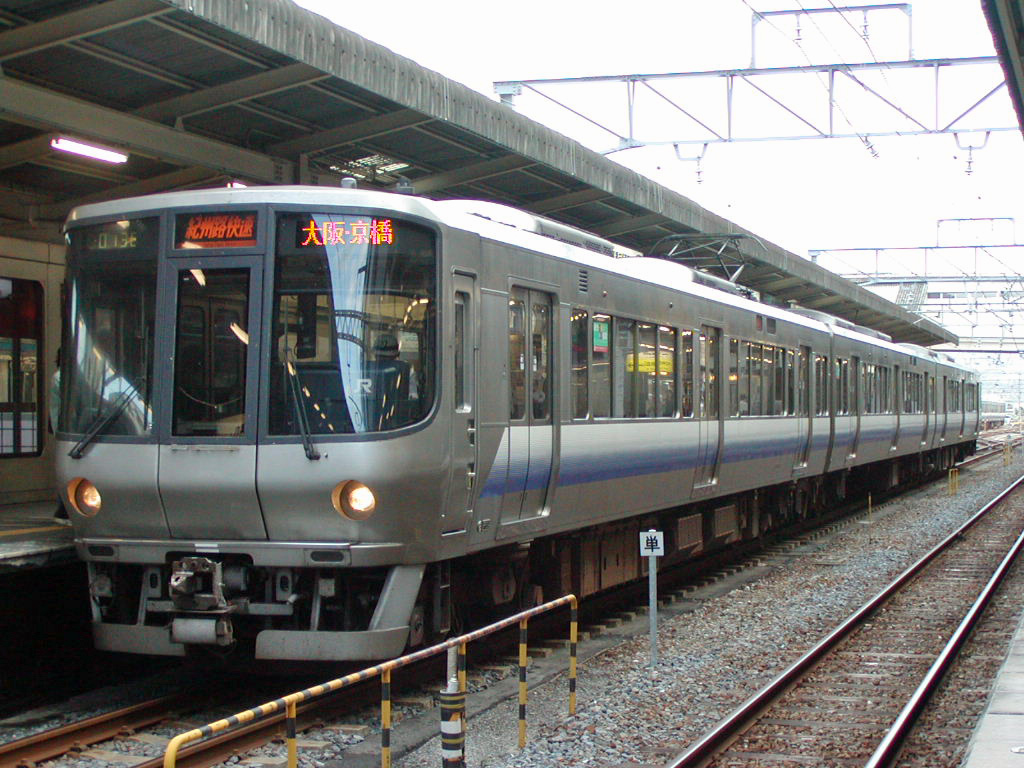 223系0代（当時3両編成）による紀州路快速 大阪方面京橋行き